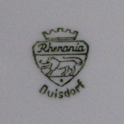 Porzellanmarke Rhenania Duisdorf, Ende der 1950er Jahre